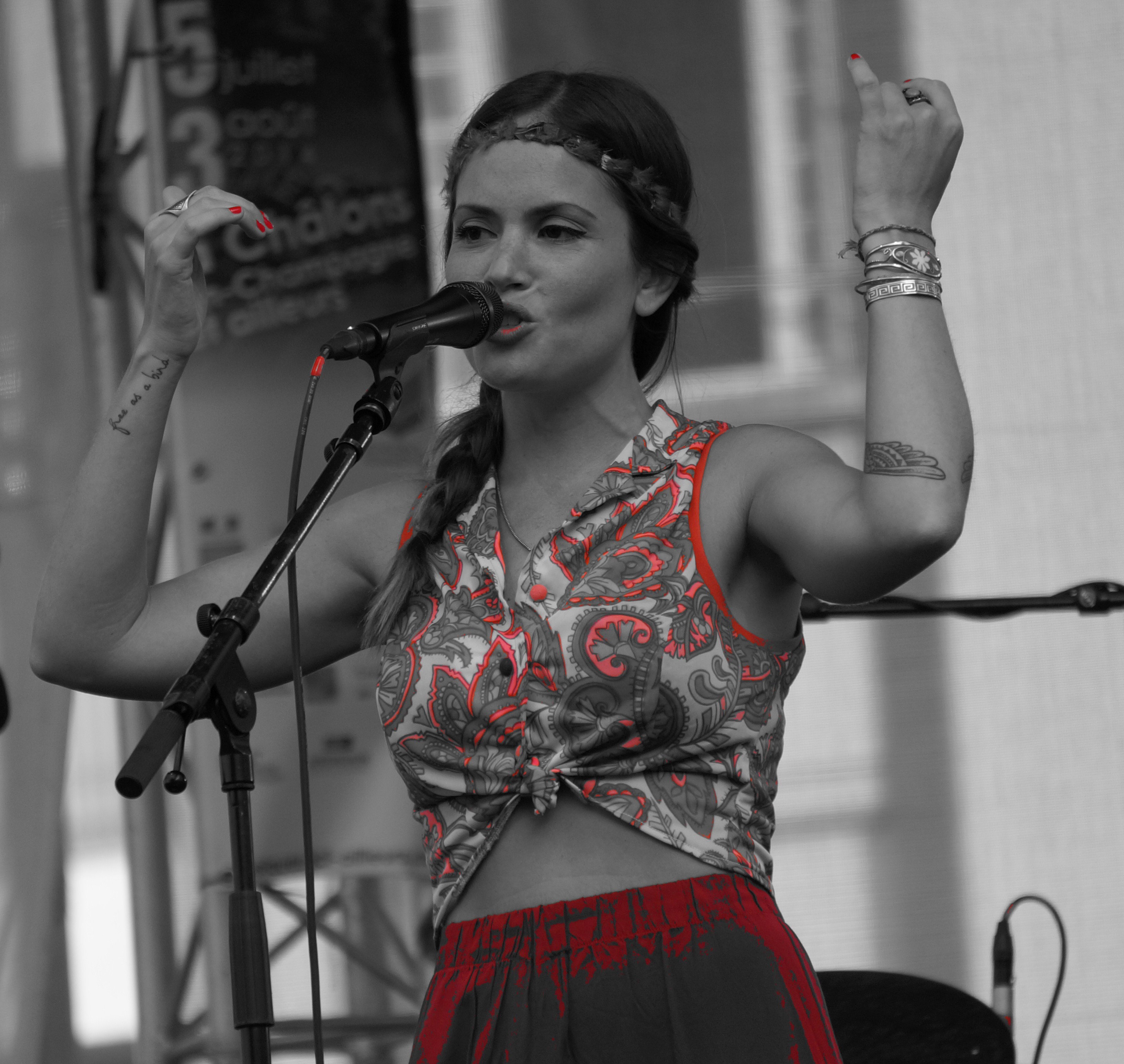 Natalia_Doco, place de la République.